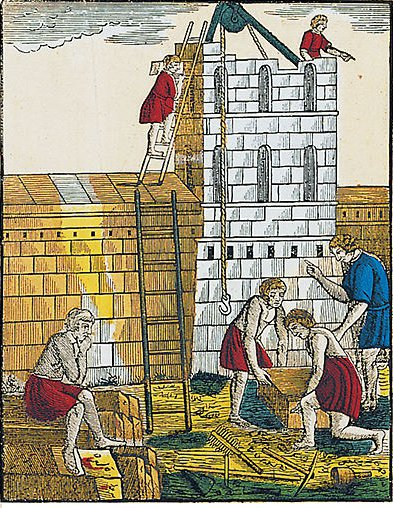 Création de la forteresse de Montauban pour les quatre fils Aymon, d'après Histoire des quatre fils Aymon, estampes de François Georgin (1801-1863). De la fabrique de Pellerin, imprimeur-libraire, Epinal, 1830. Gravure sur bois en couleurs ; 45 x 34 cm. Bibliothèque nationale de France.